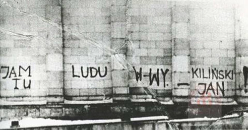 Napis na murze Muzeum Narodowego w Warszawie po ukryciu w nim pomnika Jana Kilińskiego w 1942 roku.